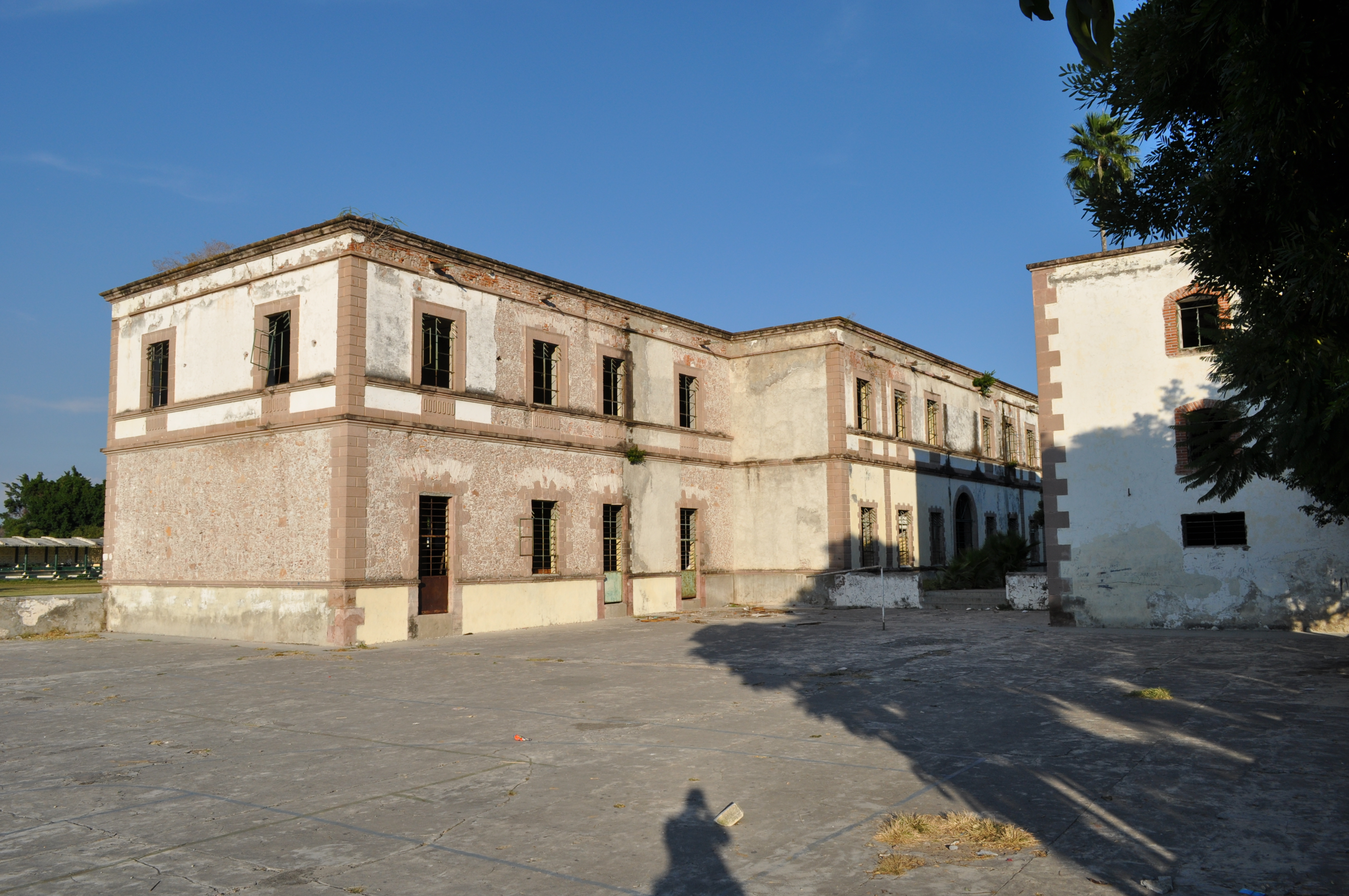 Antigua Hacienda de San Juan Chinameca